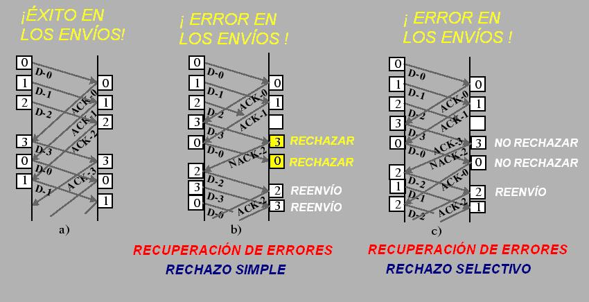 funcionamiento de la ventana deslizante durante el intercambio de información, actuación ante una perdida de datos mediante estrategias de rechazo simple y de rechazo selectivo